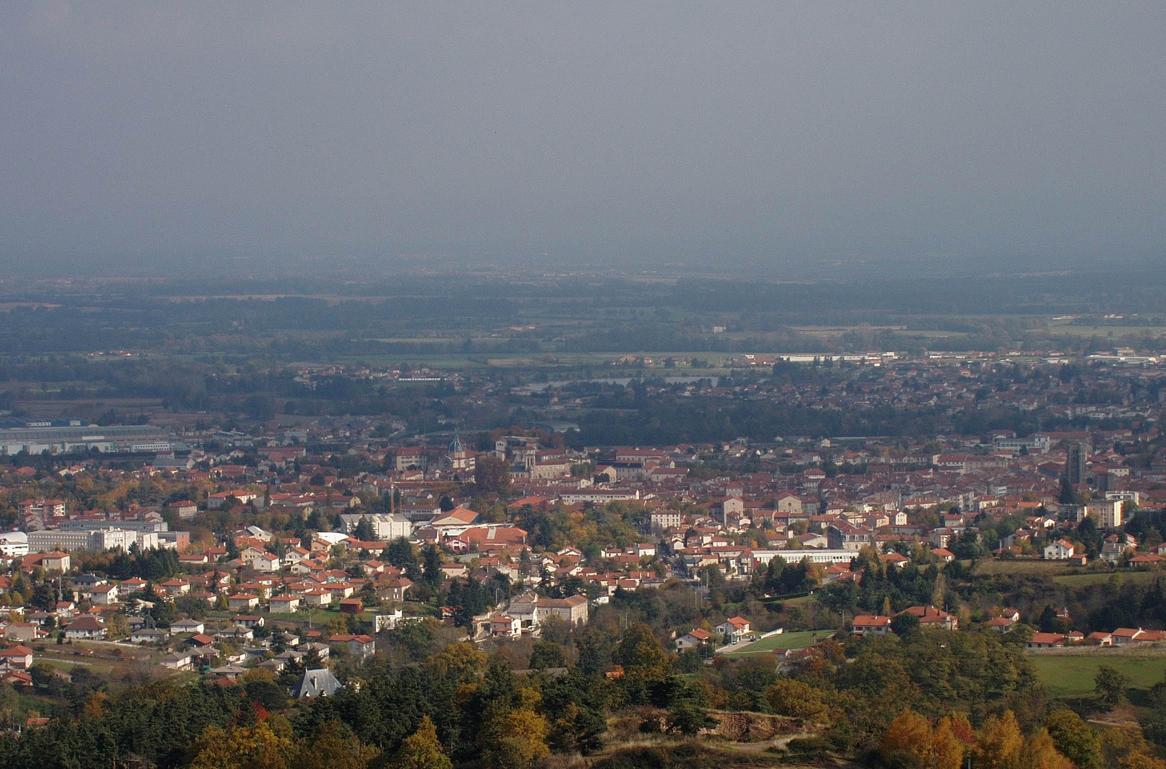 Montbrison